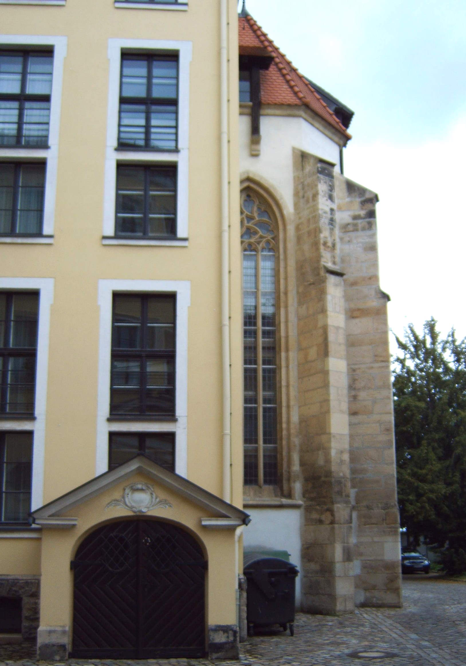 Blick von Süden auf die Sankt Gangolfi Kapelle Magdeburg